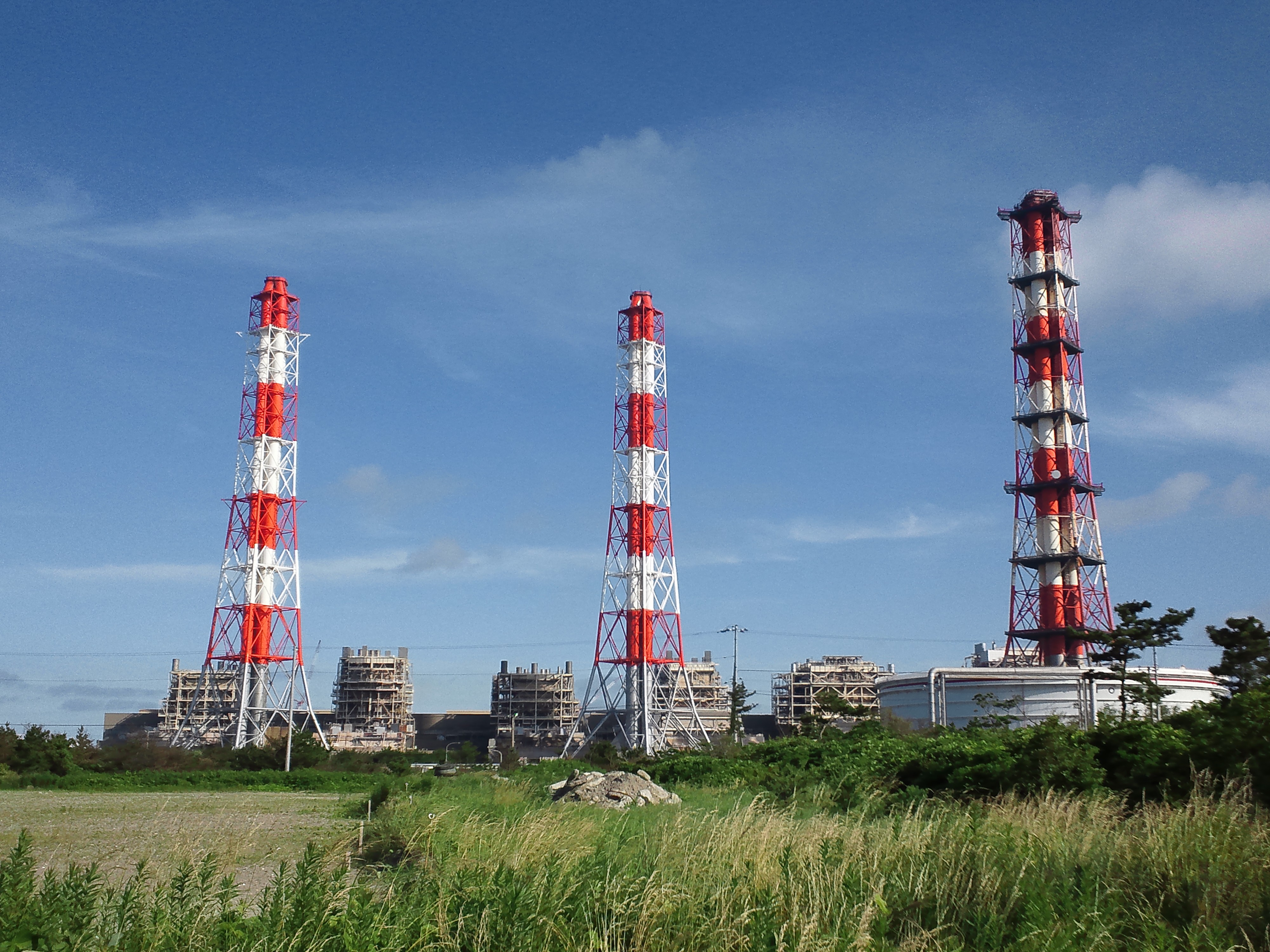 東京電力鹿島火力発電所